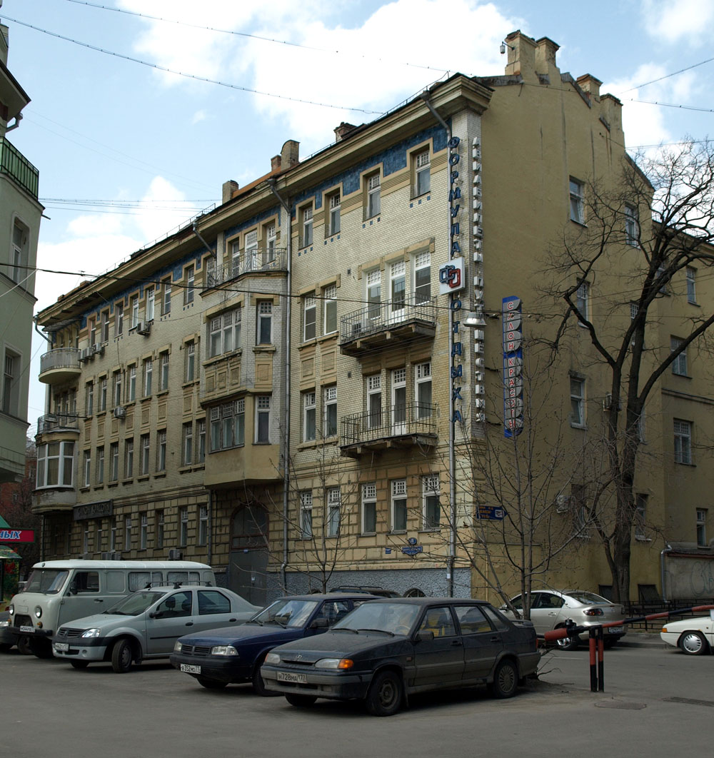 18, Bolshaya Molchanovka, Moscow